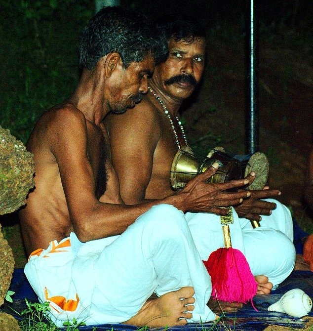 അയ്യപ്പൻപാട്ട്